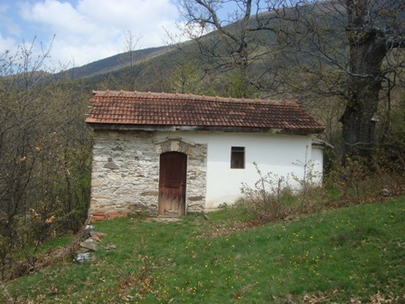 Храм_св.Петка,С.Куново